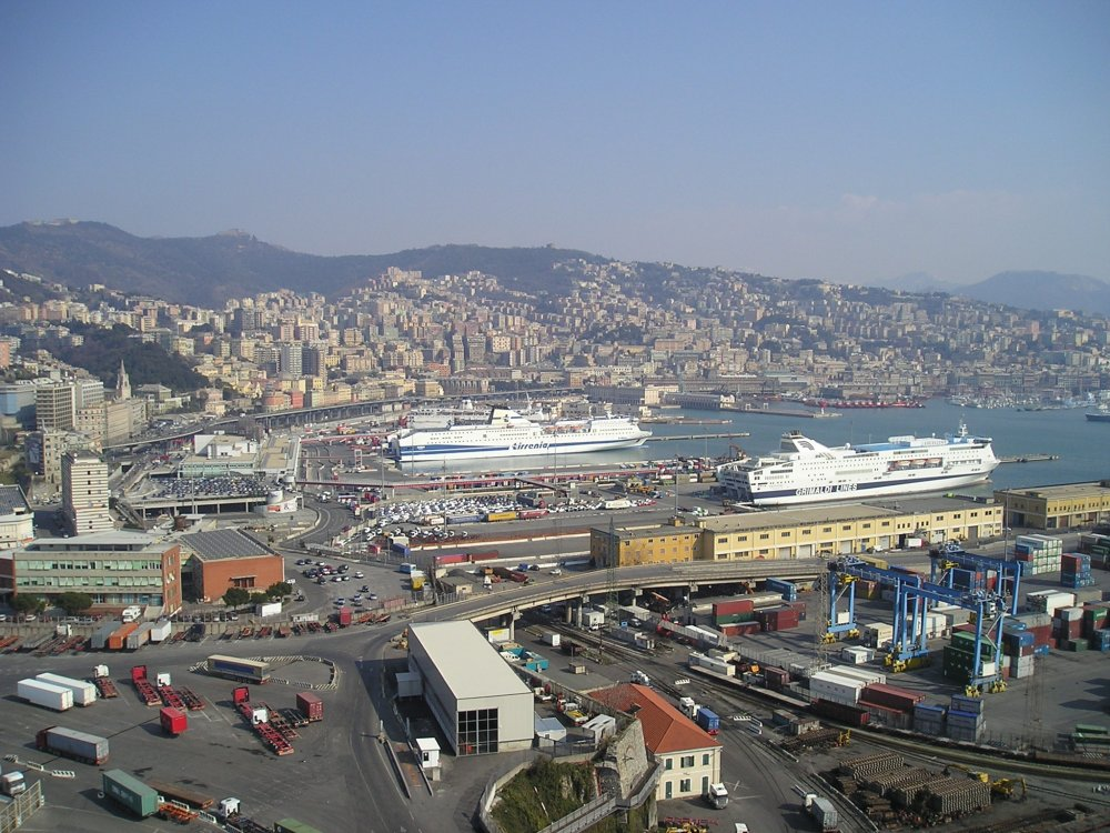 Il porto di Genova fotografato dalla cima della Lanterna.